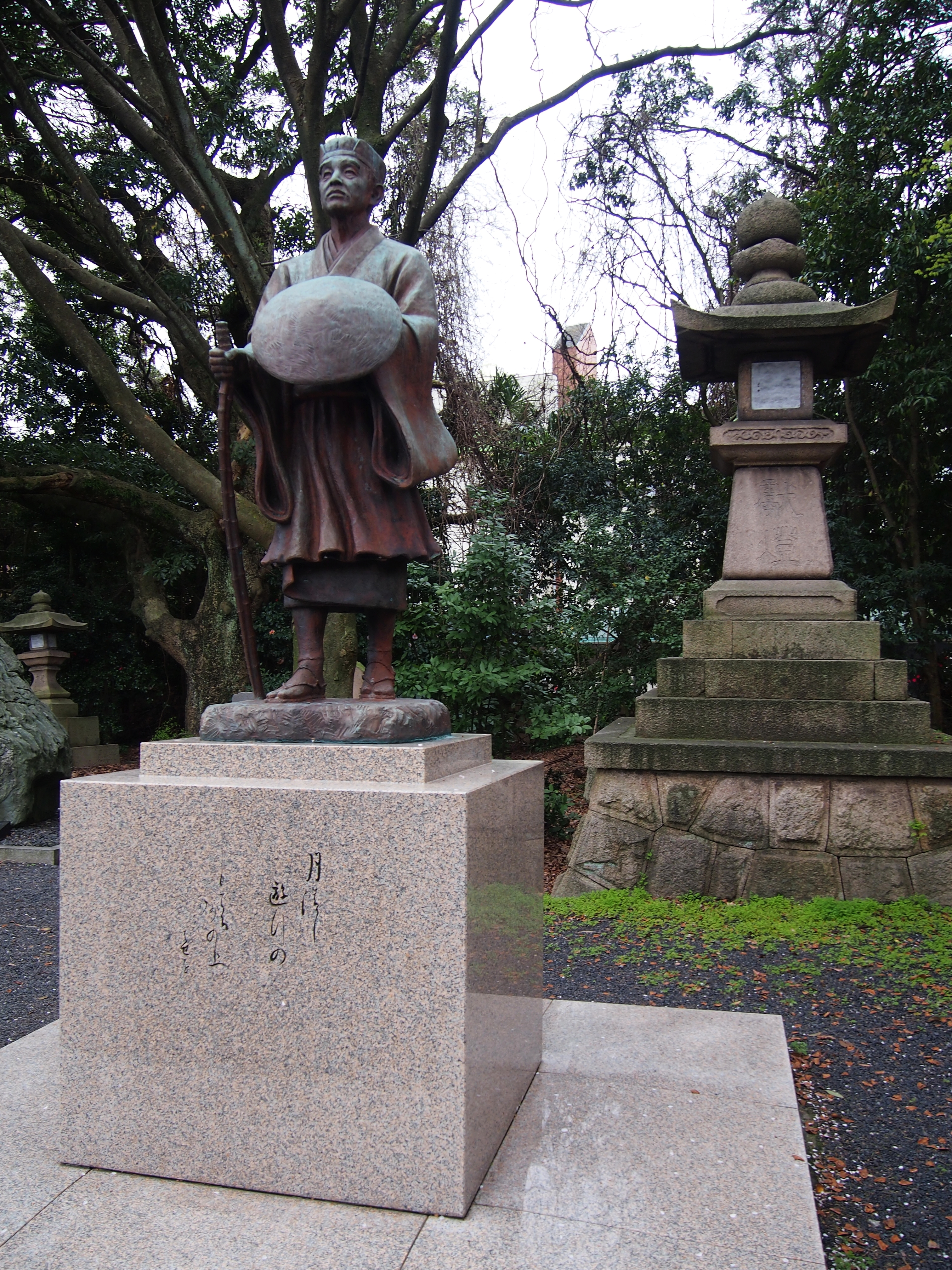 福井県敦賀市の氣比神宮境内の芭蕉像